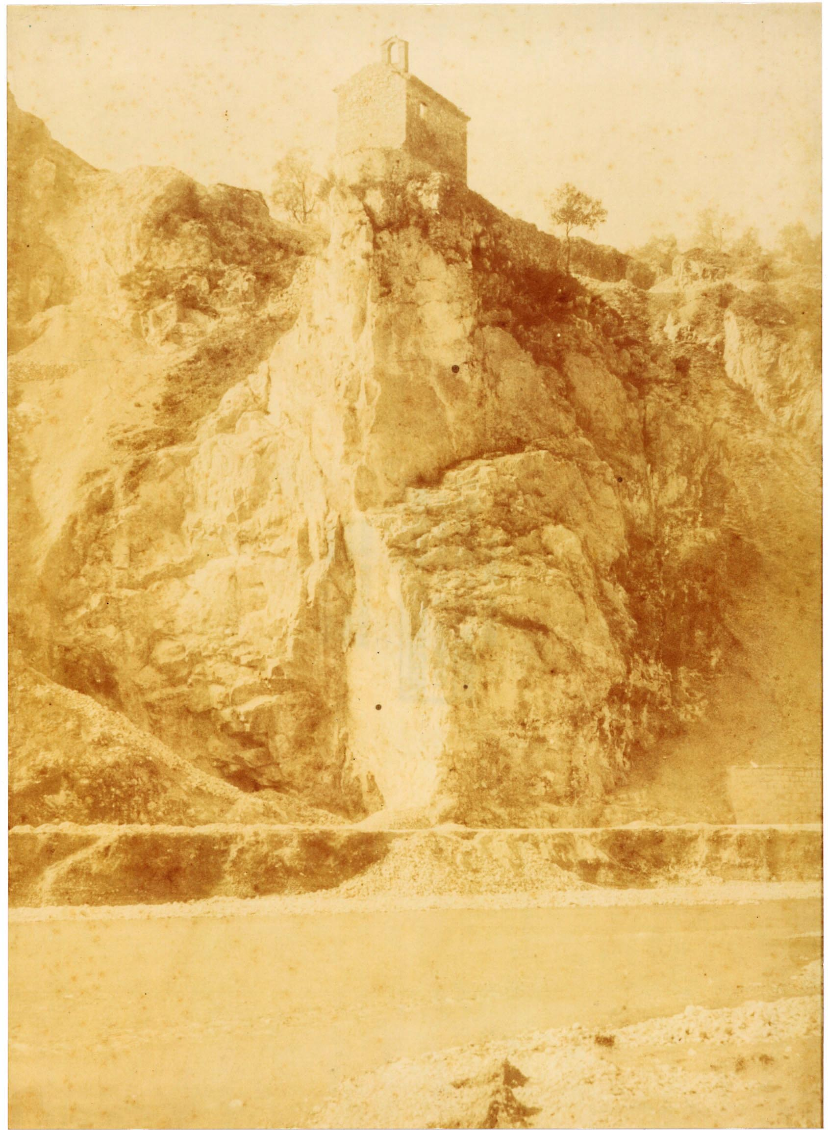 Chapelle St Pons, 1855, anonyme, papier salé d'après calotype.